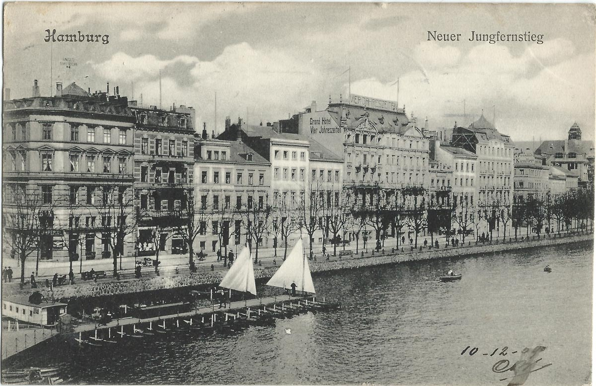 Vue de Hambourg au début du XXe siècle (carte postale).